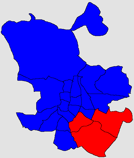 Resultado de las eleccione municipales de Madrid por distritos. En azul, distritos ganados por el PP; en rojo, distritos ganados por el PSOE. En Vicálvaro también ganó el PSOE.